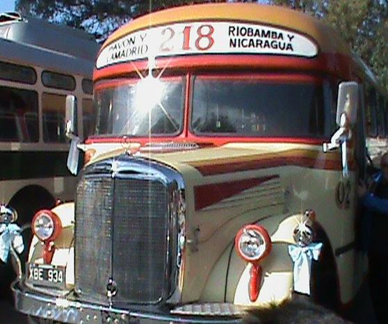 Mercedes-Benz de la antigua línea 218